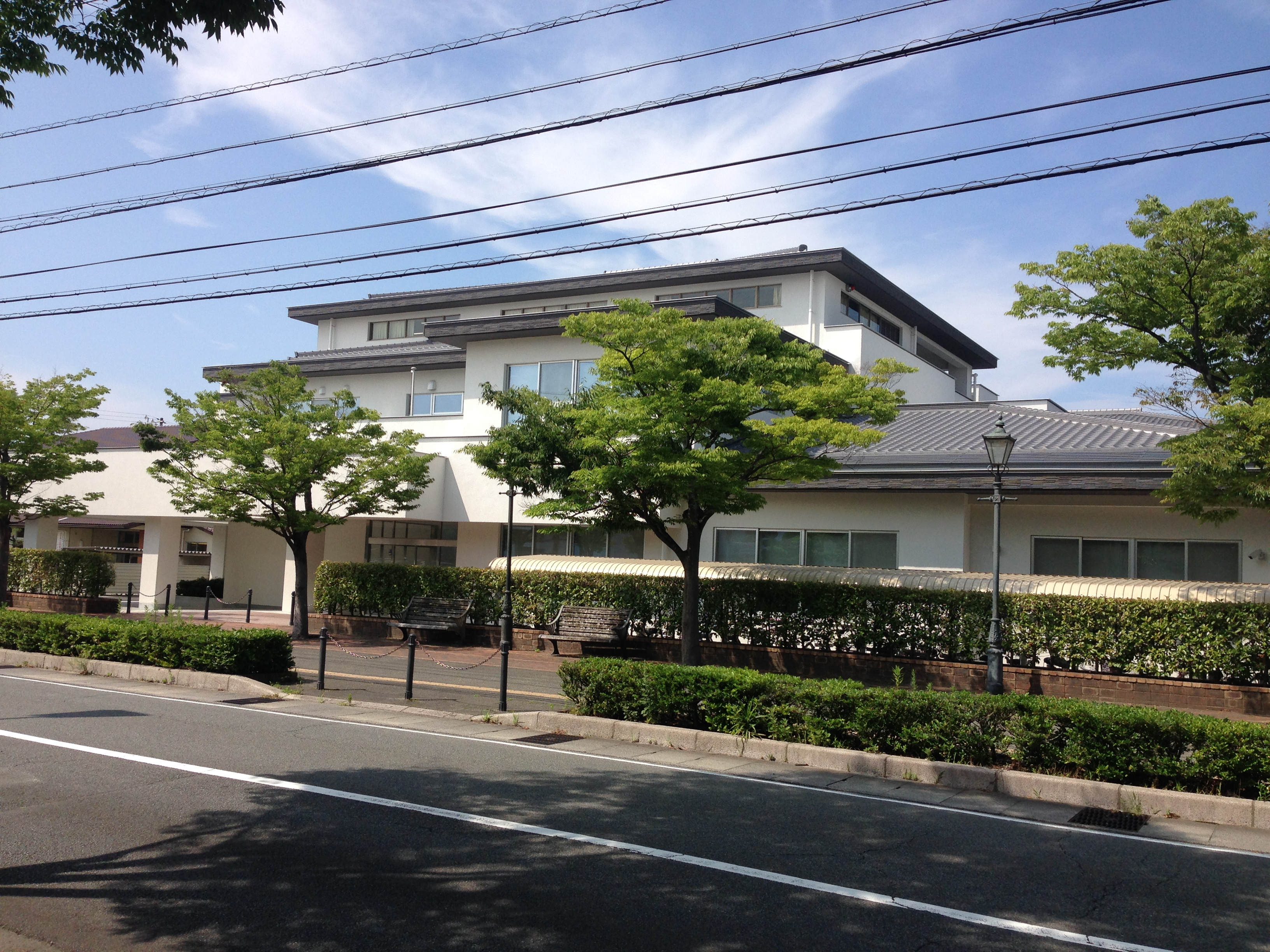 松阪市松阪図書館外観（三重県松阪市）